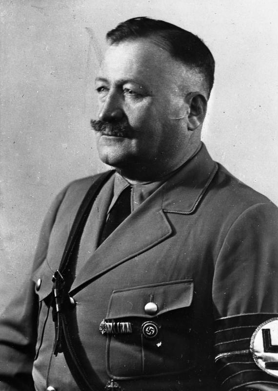 Christian Weber Christian Weber (Portrait) Bildunterschrift: Der lieben Liesl B...(?) 15.7.1934 [Unterschrift: Christian Weber]